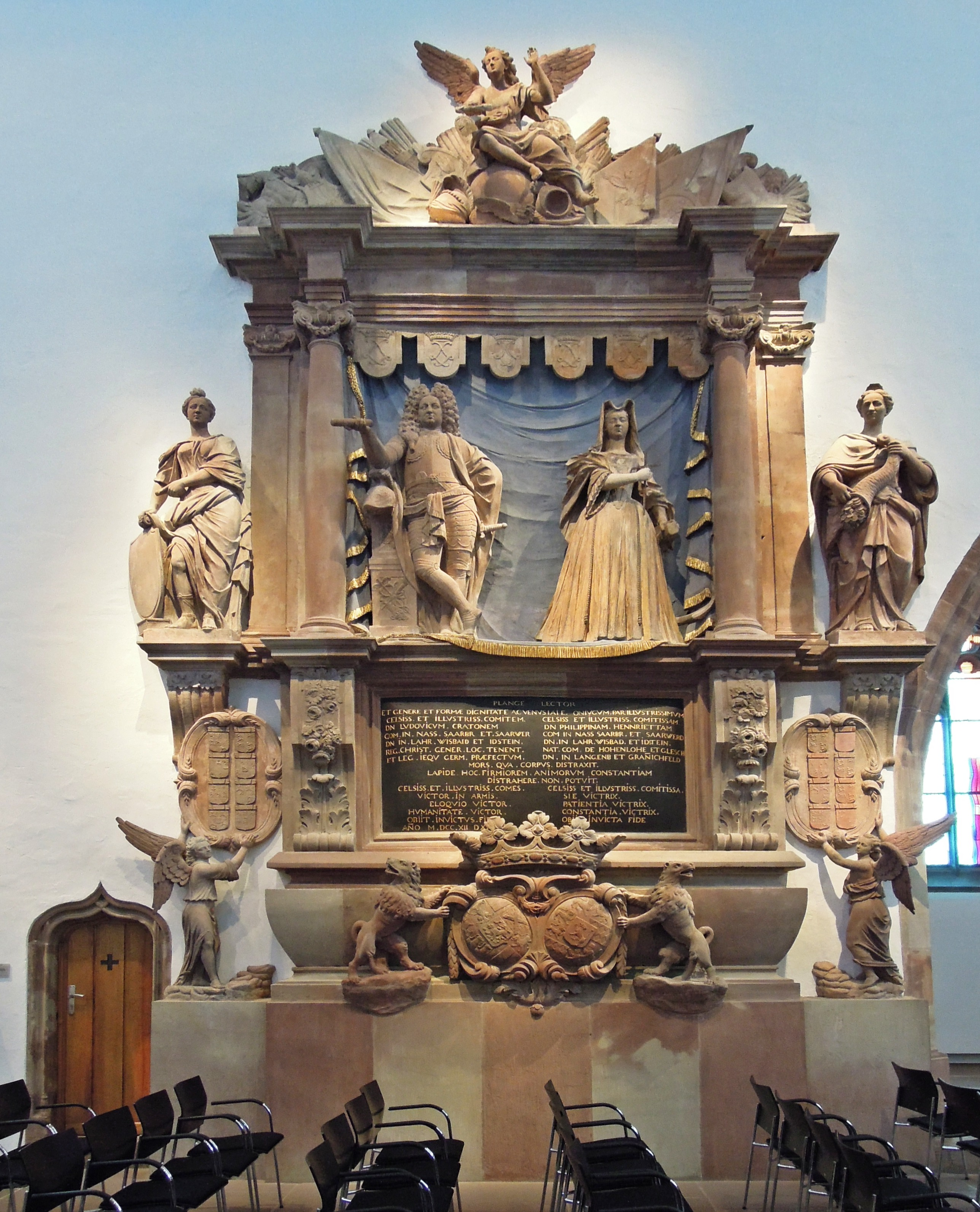 Schlosskirche in Saarbrücken: Memorial Ludwig Kraft (1663–1713), Count of Nassau-Saarbrücken and Philippine Henriette of Hohenlohe-Langenburg (1679–1751)